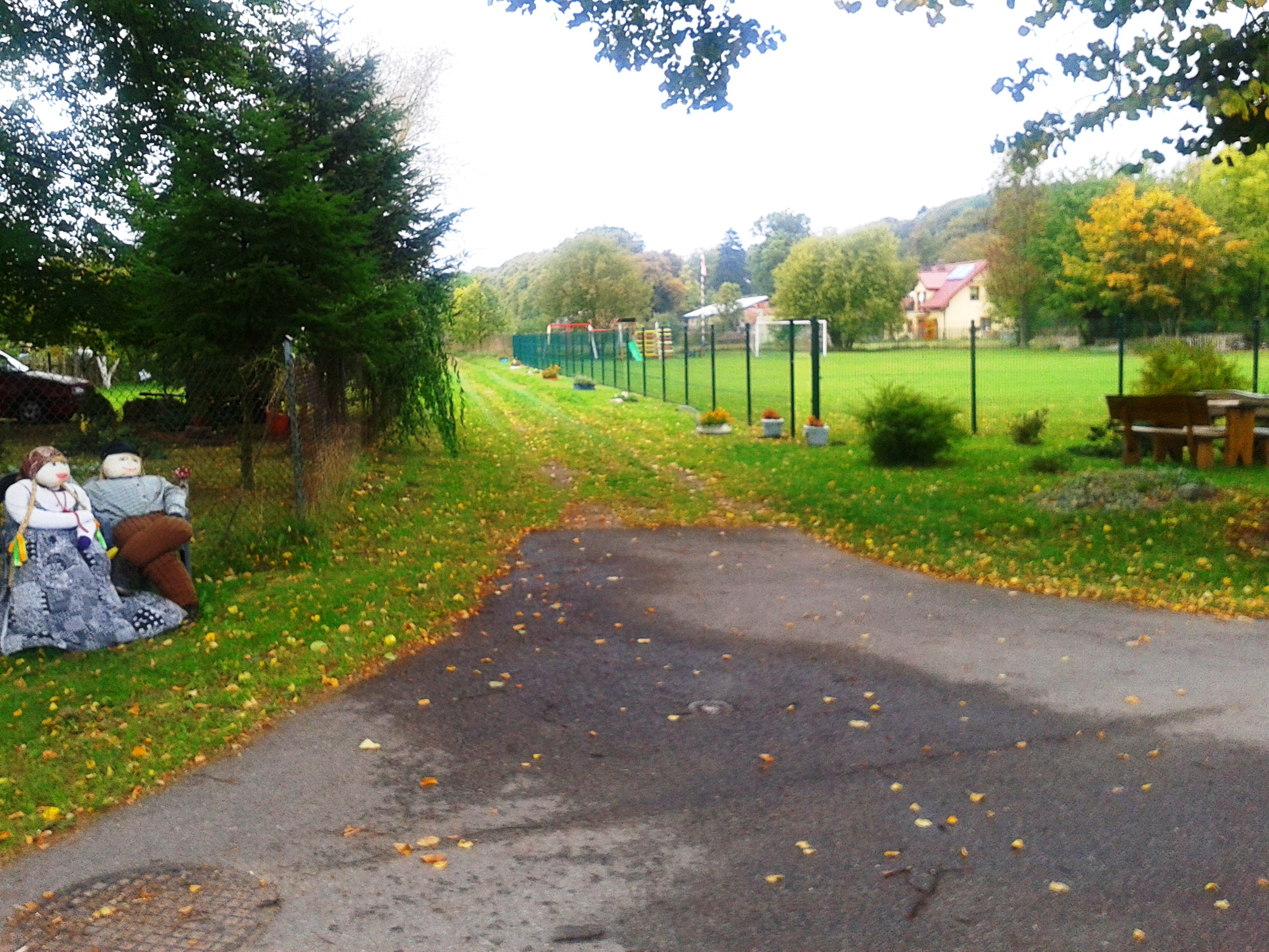 Łobżany 6